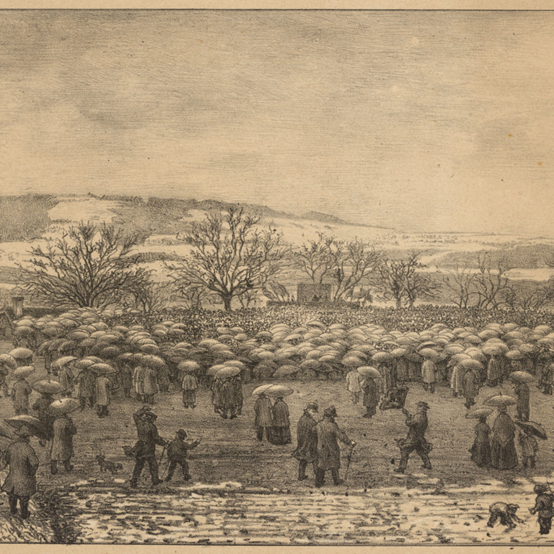 Volksversammlung in Uster den 15. Dezember 1867